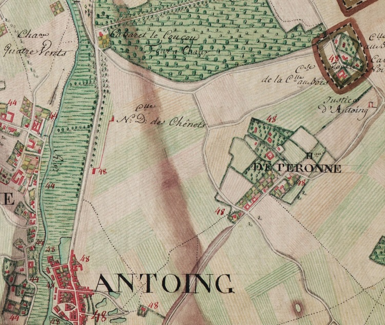 Extrait de la carte de Ferraris n° 31A